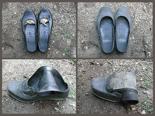 고무신으로 다른 물체를 흉내 낸 모습. 옛날에 고무신으로 놀이를 하면서 놀 때 이렇게 배나 차 모양을 만들어 놀곤 하였다.